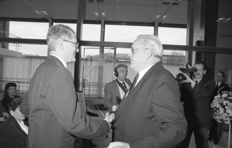 18.12.1989 Festakt anläßlich des Amtswechsel im Bundesverfassungsgericht Karlsruhe. - Amtseinführung von Helga Seibert (Amtszeit ab 10.11.89), und Dr. Jürgen Kühling (ab 12.7.89, beide I. Senat), sowie Klaus Winter (ab 10.11.89, II. Senat). - Verabschiedung der Richter am Bundesverfassungsgericht Prof. Dr. Hermann Heußner (Amtszeit bis 15.6.89) und Dr. Gisela Niemeyer (bis 2.11.89), beide I. Senat, sowie Ernst Träger (bis 2.11.89, II. Senat), denen Bundesverfassungsgericht-Präsident Dr. Roman Herzog das Große Verdienstkreuz mit Stern und Schulterband des Verdienstordens der Bundesrepublik Deutschland aushändigt.